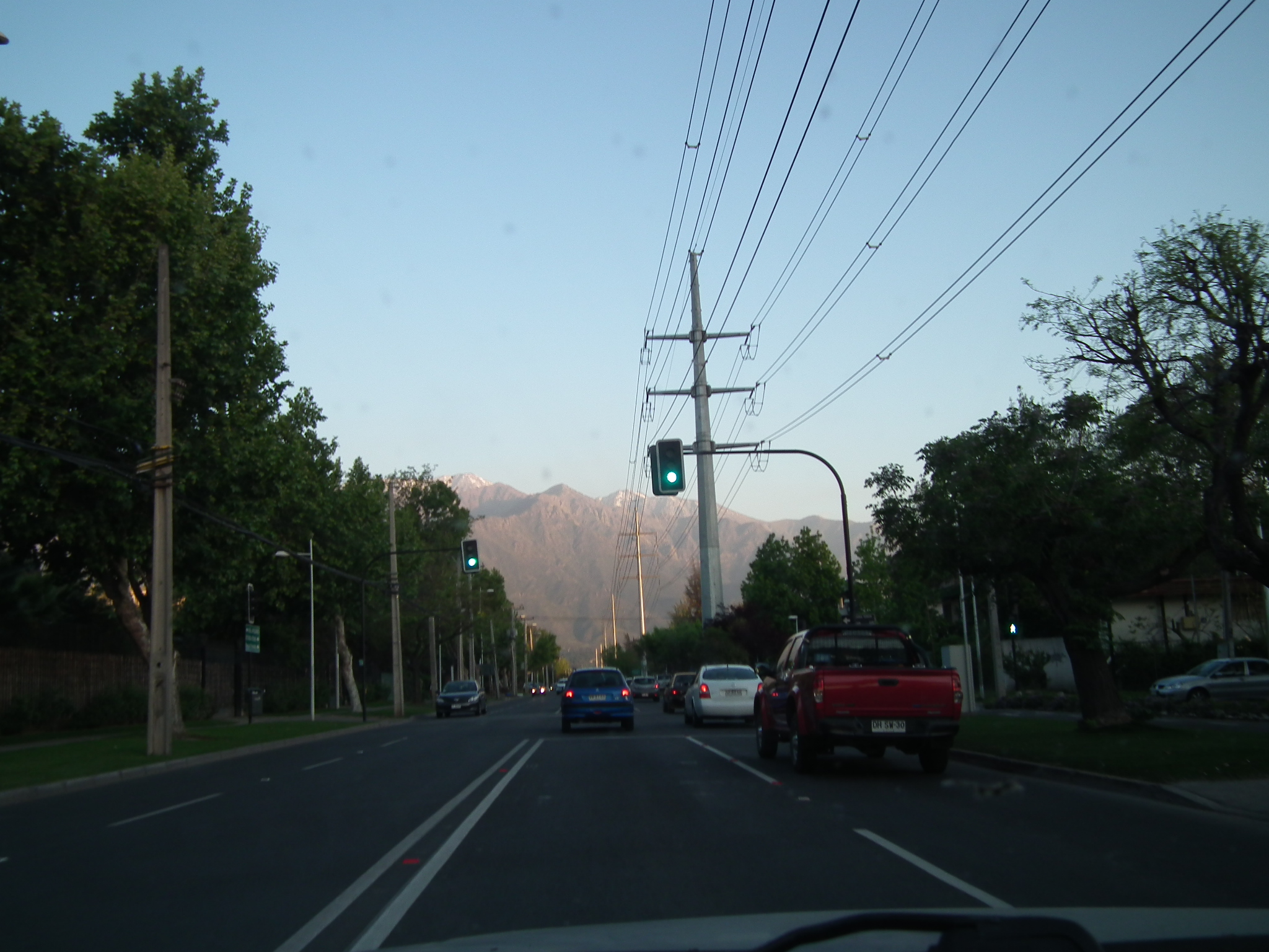 Avenida Cuarto Centenario en Las Condes, Santiago , Chile